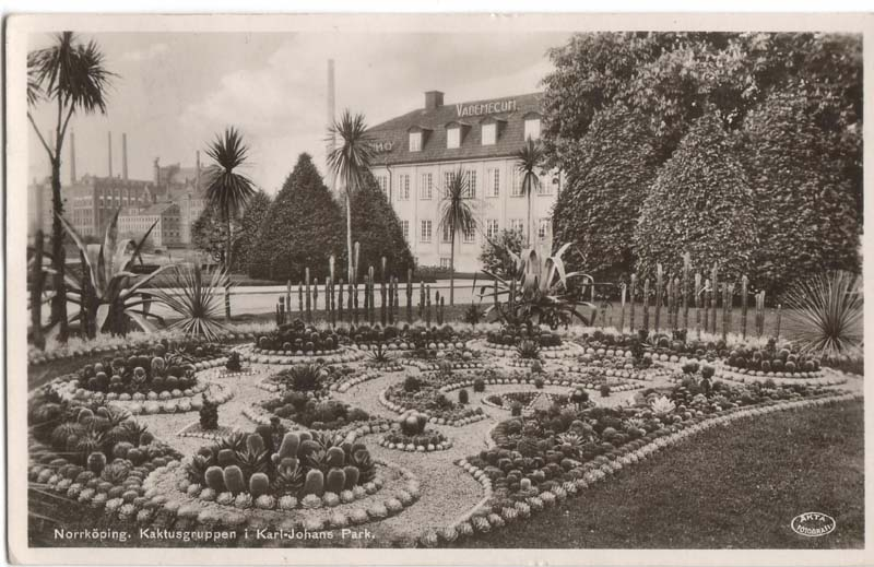 Kaktusplanteringen vid Motala ström i Norrköping, motiv för år 1937. I bakgrunden syns Tuppens textilfabrik.